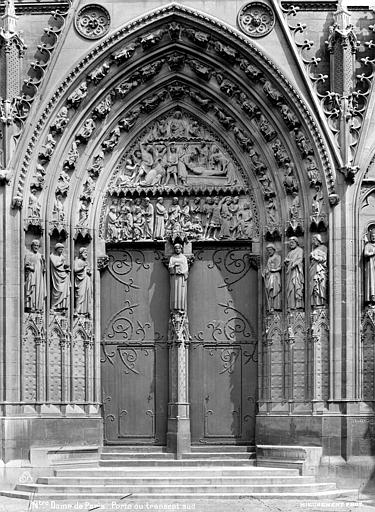 Portail du transept sud : partie centrale